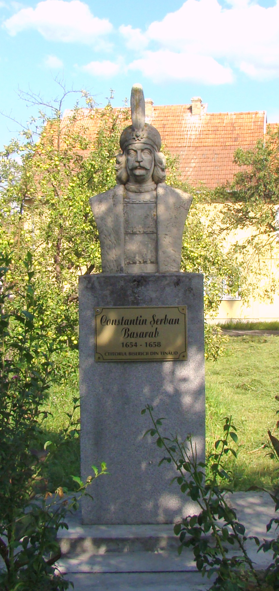 Biserica ortodoxă „Sf. Dumitru”, localitate componentă TINĂUD; oraș Aleșd